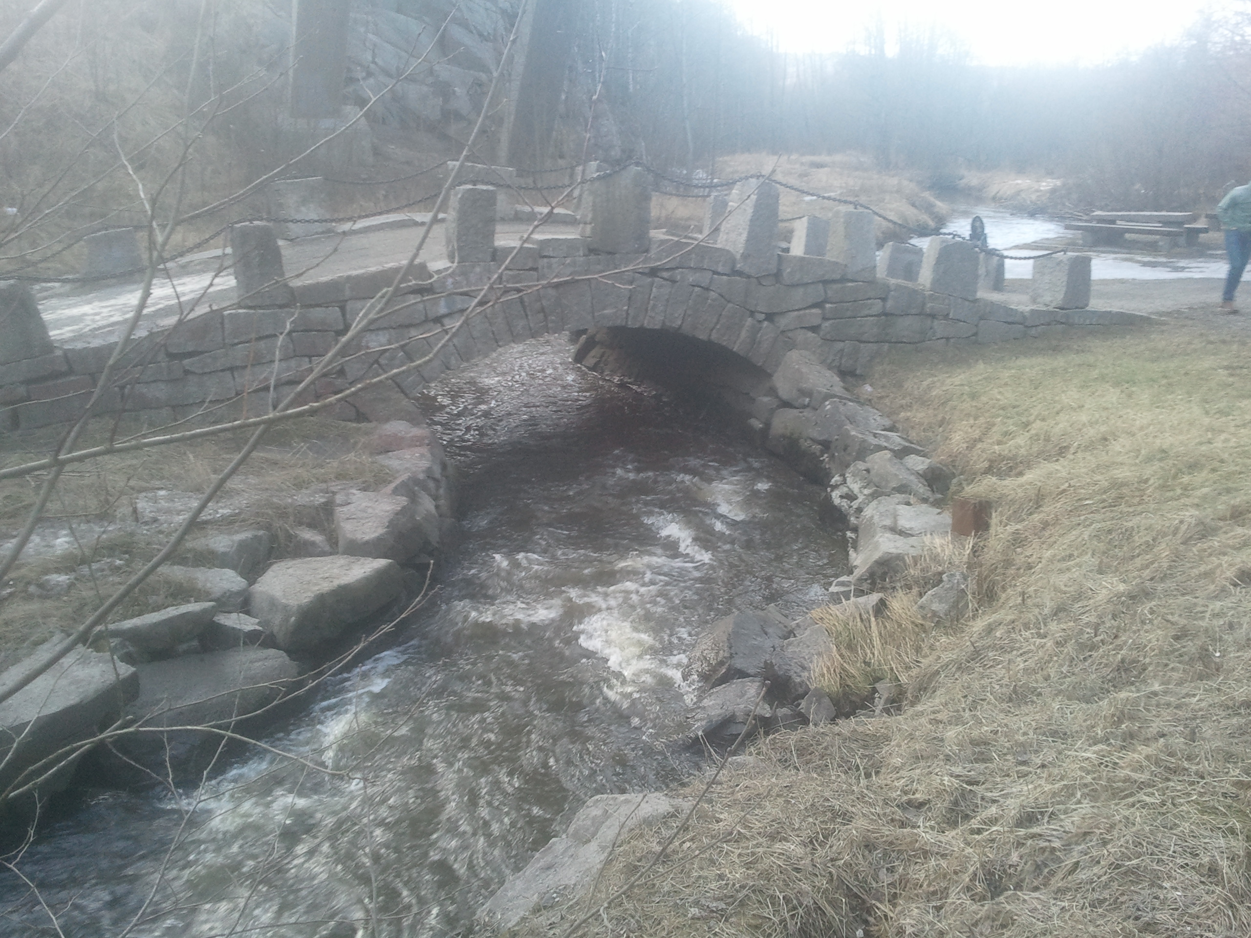 Den Fredrikshaldske kongevei over Dalsbekken nær Gjersjøen